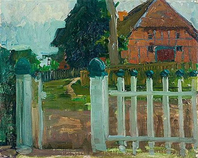 Bauerngehöft und wießer Gartenzaun